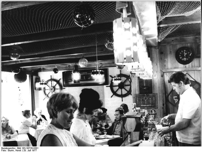 Berlin, Gaststätte "Marinehaus", Schankraum Zum Beitrag: "Marinehaus": See, Salz- und Teerromantik im Herzen der Hauptstadt ADN-ZB Sturm - 20.7.77 - Zu Gast im "Marinehaus" am Märkischen Ufer in Berlin - ein riesiges Fischernetz, Steuerräder, Positionslampen, Abbildungen von Segelschiffen, Anker und auch ein Rettungsring lassen die eigentümliche See-, Salz- und Teerromantik mitten im Herzen der Hauptstadt erwachen. Der Wirt, Gunther Schröder (rechts), der früher selbst als Steward zur See gefahren ist, verbürgt sich für die Echtheit dieser originellen Sammlung. Was nicht aus dem Bestand des eigenen Seesacks ist, hat er von Fischern der Ostseeküste und mit Hilfe der GST zusammengetragen, um diese in Berlin einmalige Gaststätte einzurichten, die schon vor fast 60 Jahren Matrosen der revolutionären Volksmarinedivision beherbergt hat. Zur Beliebtheit des "Marinehauses" tragen nicht nur die phantasievolle Ausstattung und das reizvolle Angebot der guten Küche bei, sondern auch die nette und zuvorkommende Bedienung. Auf unserem Foto die Serviererinnen Gisela Höne (links) und Ellen Beyer. (Bitte beachten Sie hierzu auch S0720-300N und 302N !)